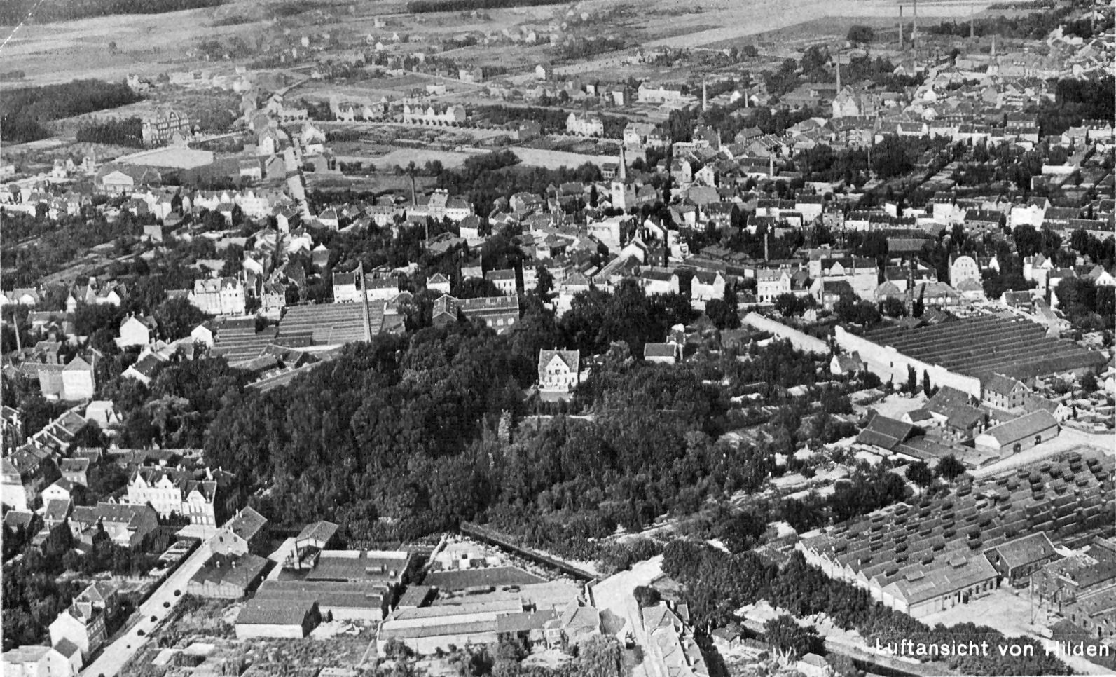 Luftaufnahme von Hilden 1960er Jahre